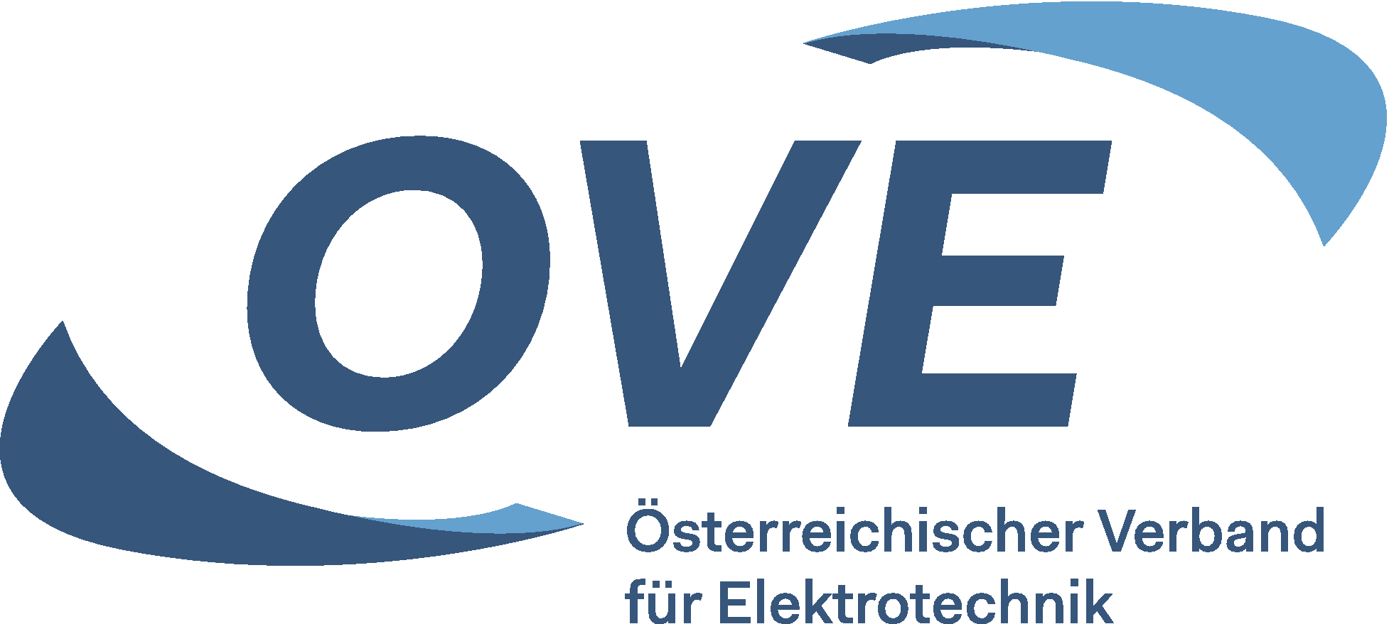 neues OVE Logo mit Claim